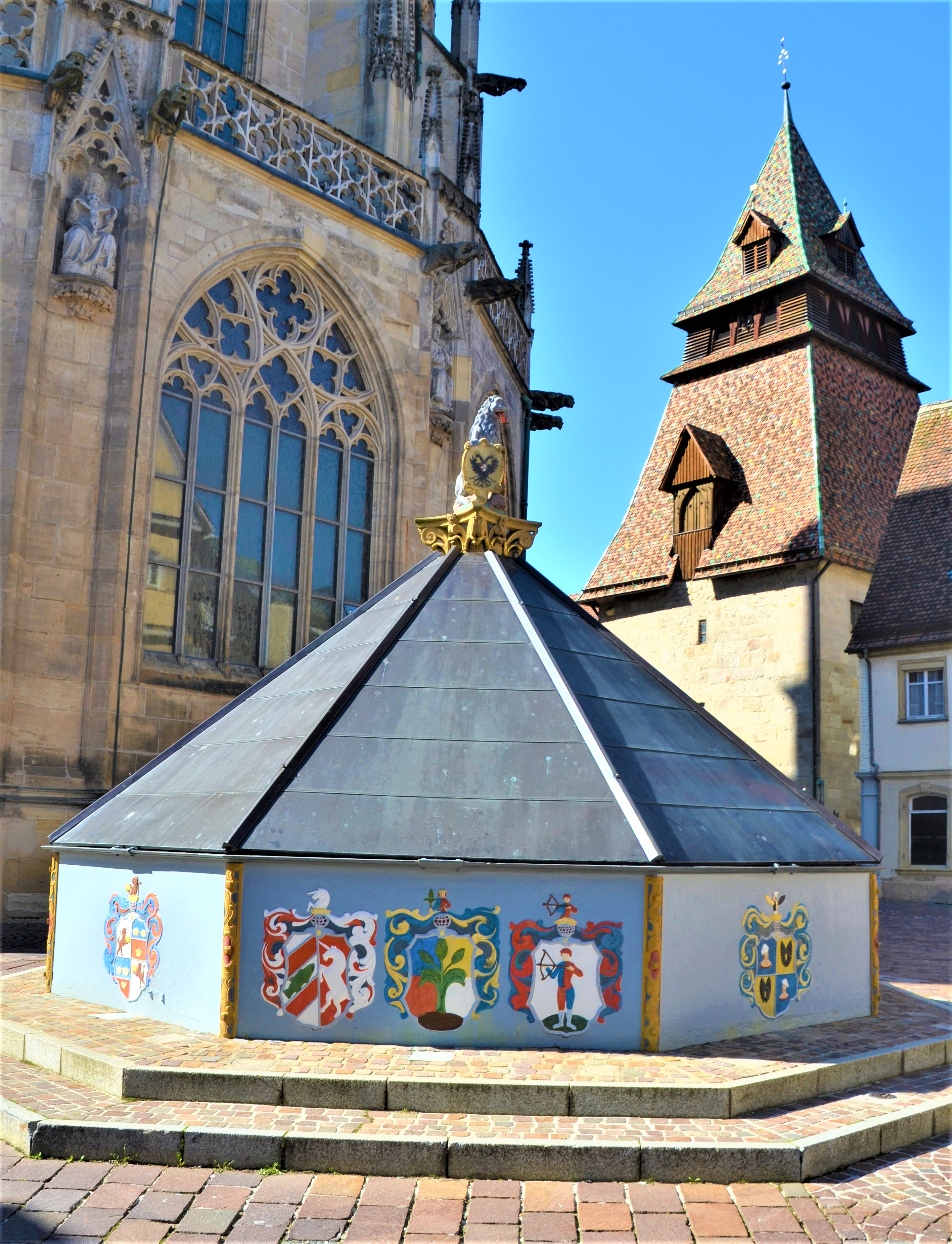 Löwenbrunnen auf dem Münsterplatz in Schwäbisch Gmünd mit Winterabdeckung